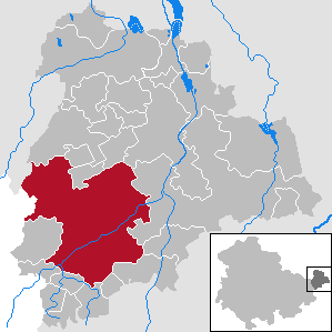 Schmölln in Thuringia - District Altenburger Land